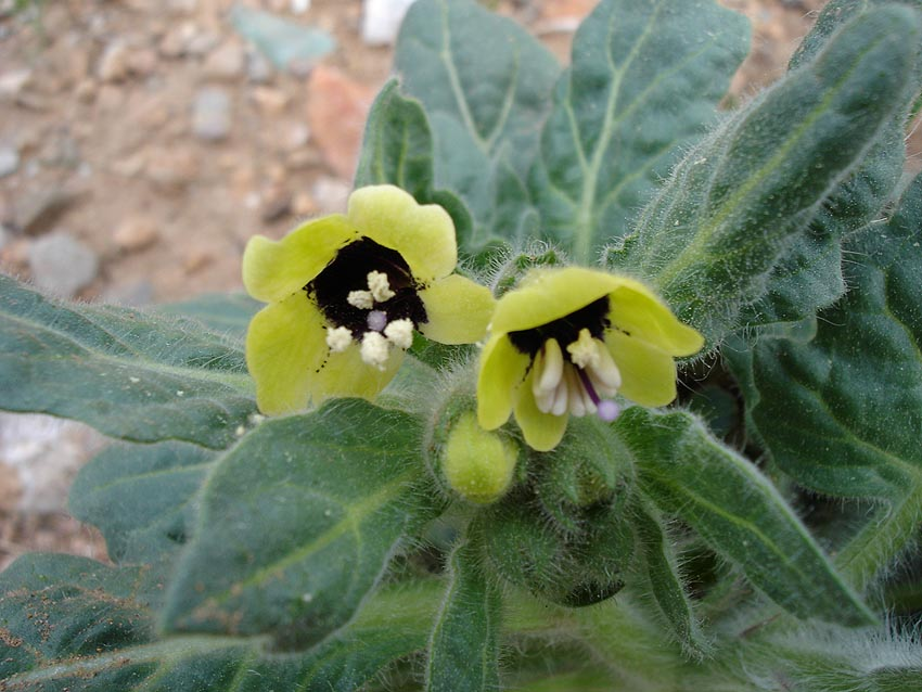 Hyoscyamus albus (jusquiame blanche)Photo prise le 28 mars 2005 à Salses-le-Château Jean Tosti 2005